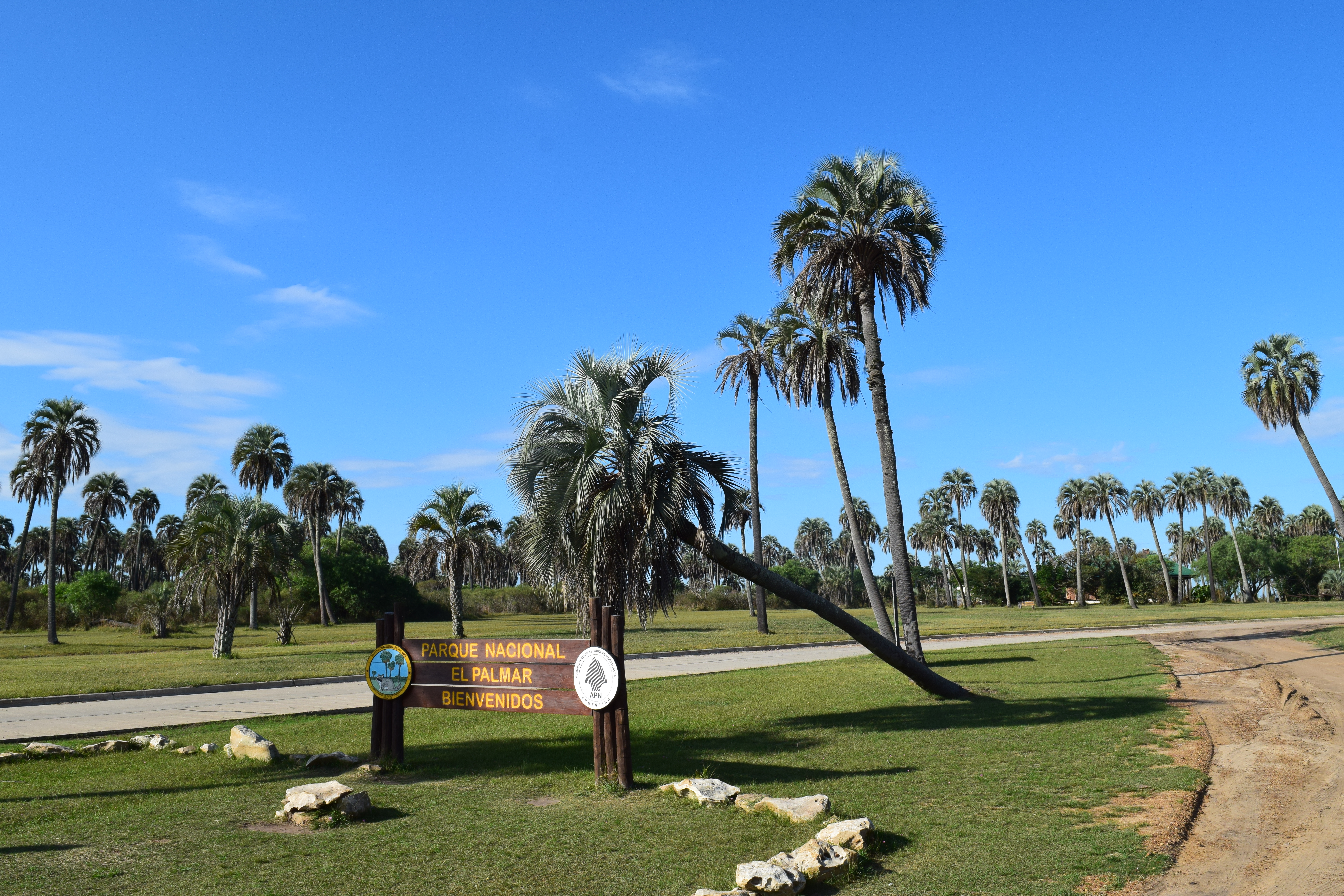 Acceso de ingreso al Parque Nacional El Palmar, en cercanías de Ubajay, provincia de Entre Ríos.